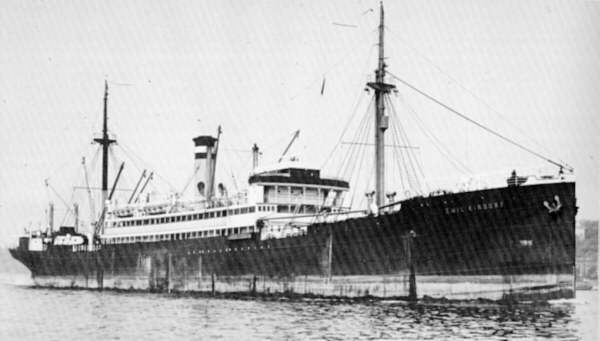 Das Kombi schiff EMIL KIRDORF der reederei Hugo Stinnes/ dann Hapag